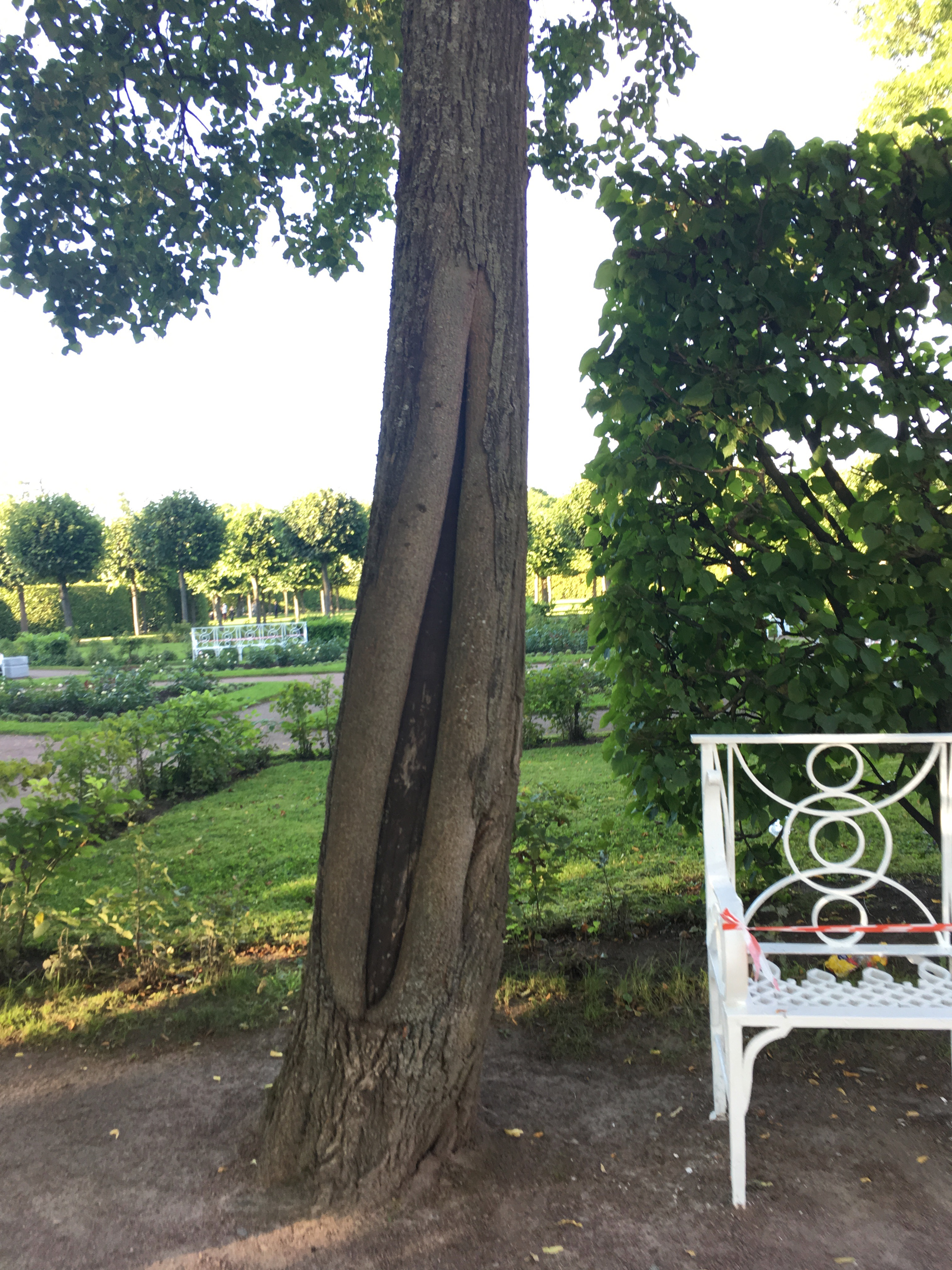 樹木力學結構，樹木空洞化後兩側生長出加粗的結構做為支撐，其稱作窗框材。